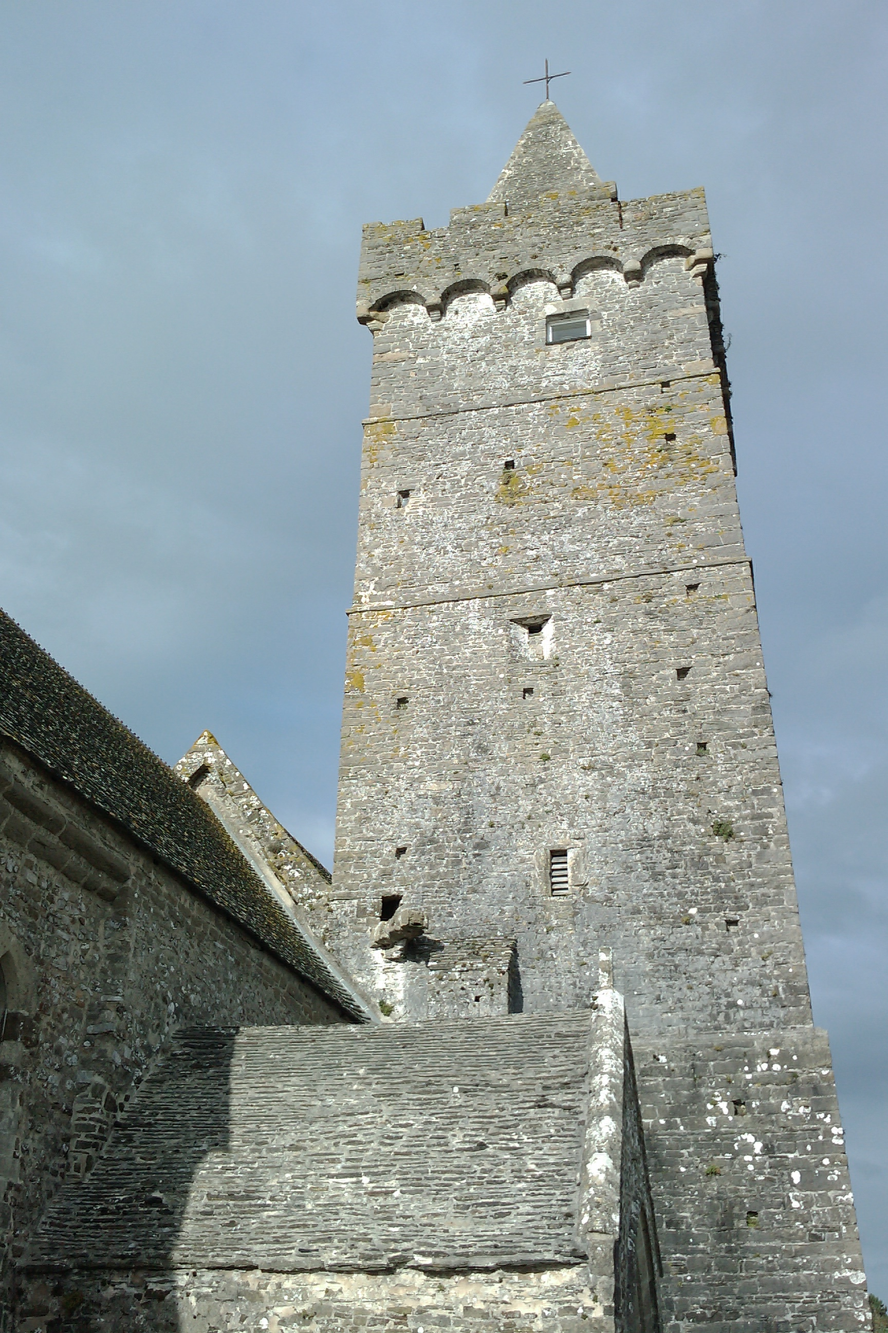 Église classée Notre-Dame de Portbail .